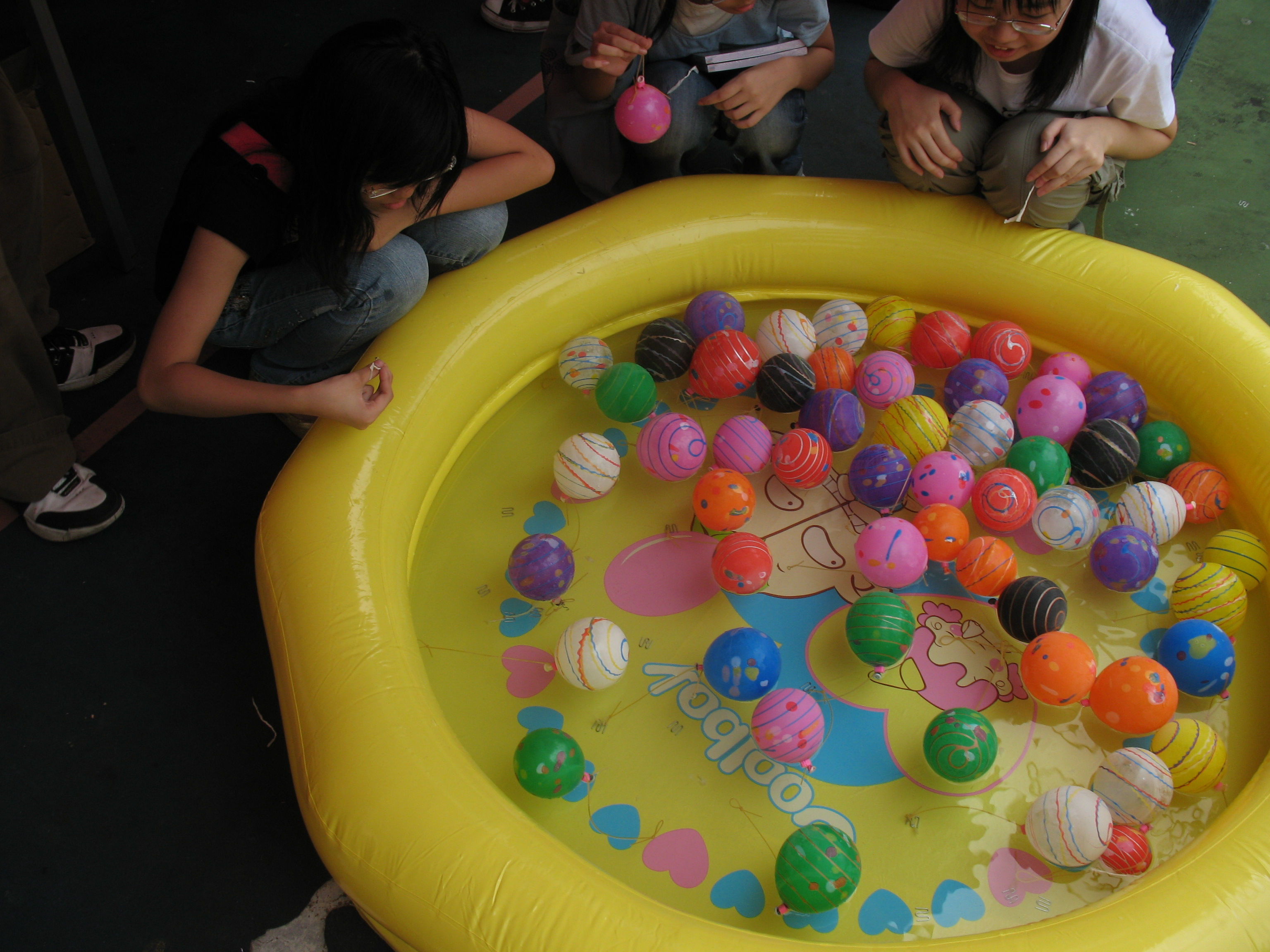 螢之祭2007攤位遊戲埸地中的釣水球屋台